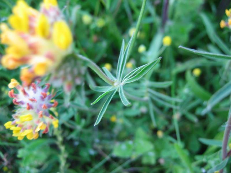 Blatt eines Gewöhnlichen Wundklees Anthyllis vulneraria